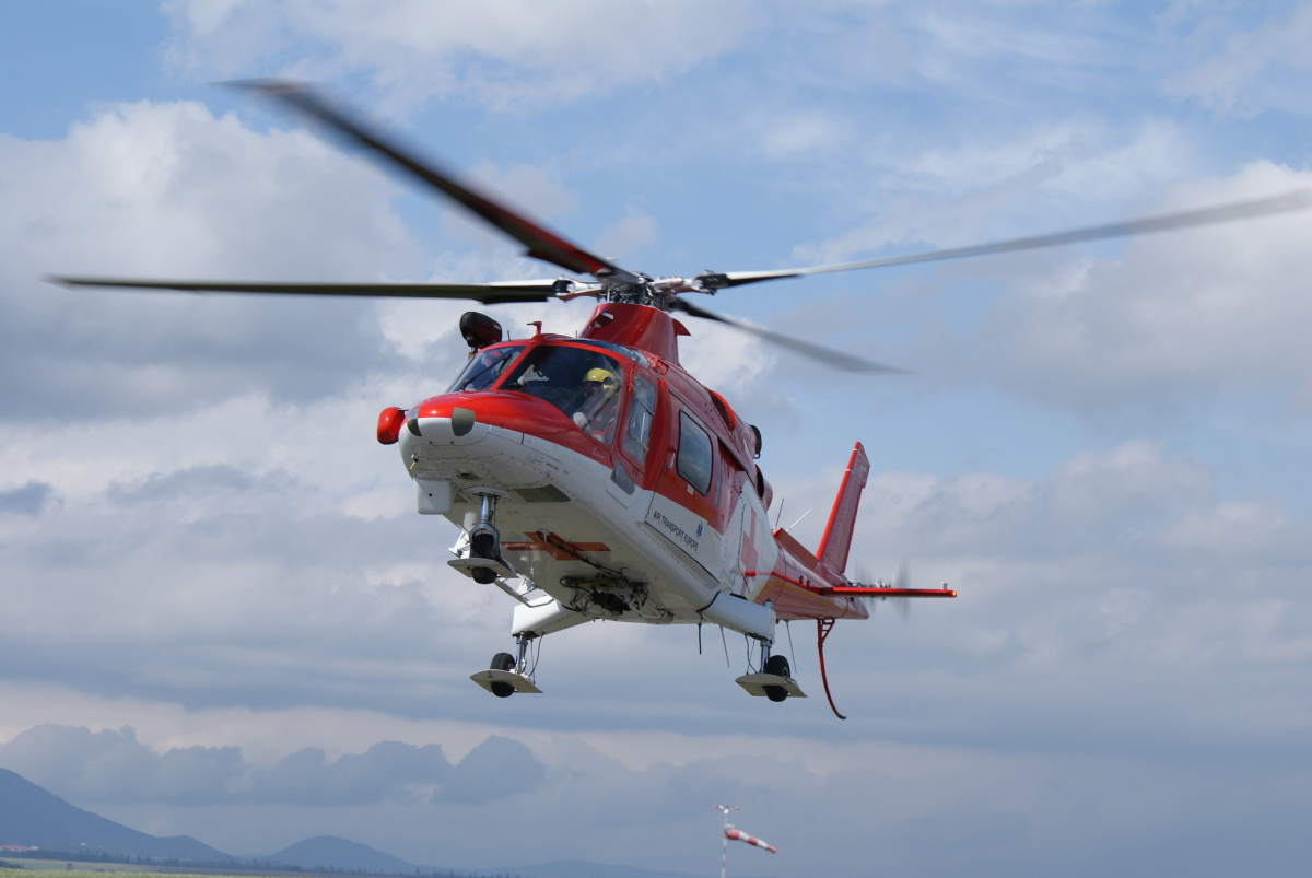 Agusta A109K2 - leteckej spoloočnosti Air Transport Europe Poprad na letisku v Poprade - Slovakia